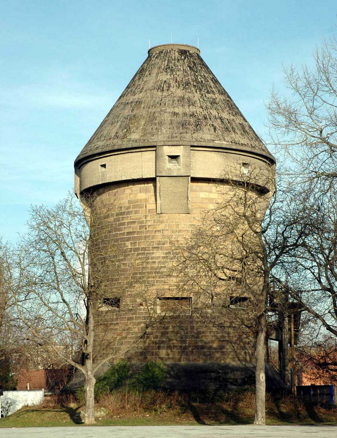 General-Wever-Turm in Heilbronn, Hochbunker der Bauart Dietel, 1940 erbaut